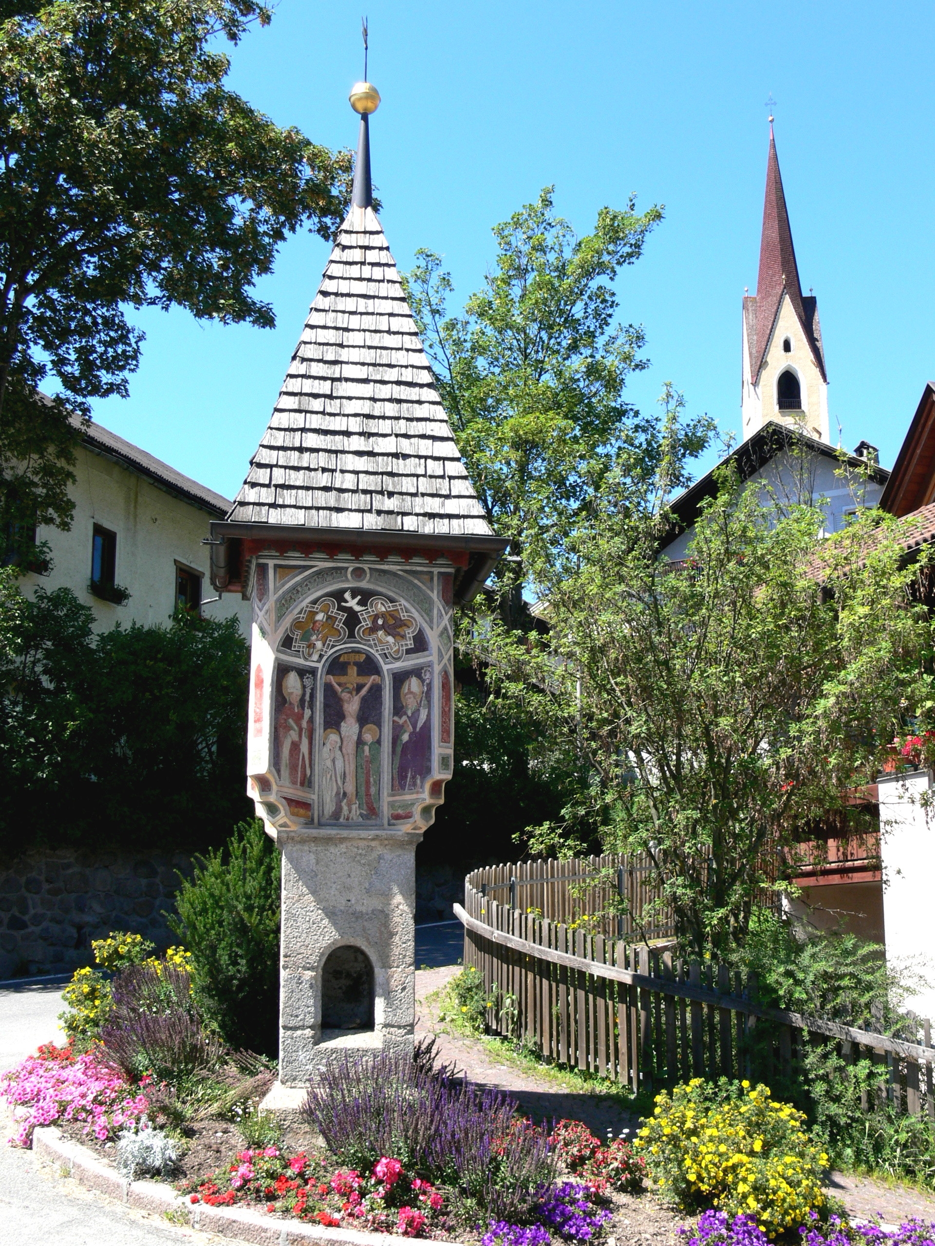 Tabernakelbildstock in Taisten.